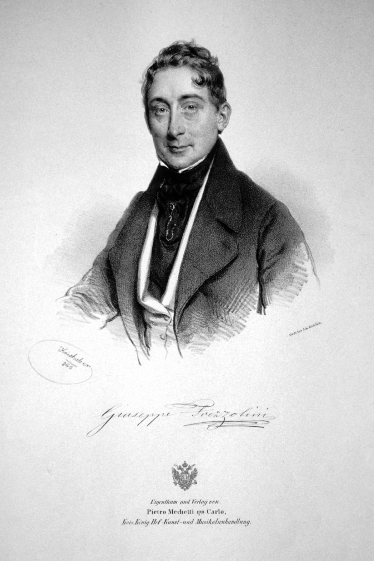 Giuseppe Frezzolini (1789-1861) italienischer Opernsänger (Bass). Vater der Sopranistin Erminia Frezzolini. Lithographie von Josef Kriehuber, 1840